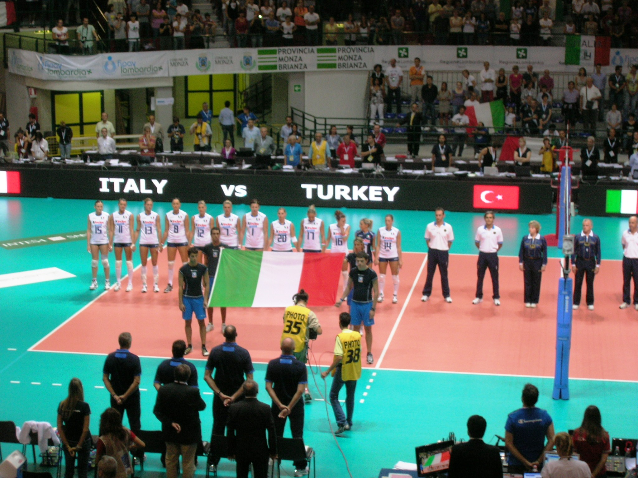 Partita: Italia - Turchia 2-3